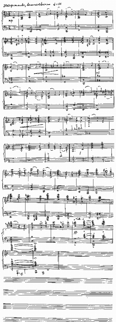 Клавир официального Гимна Санкт-Петербурга.